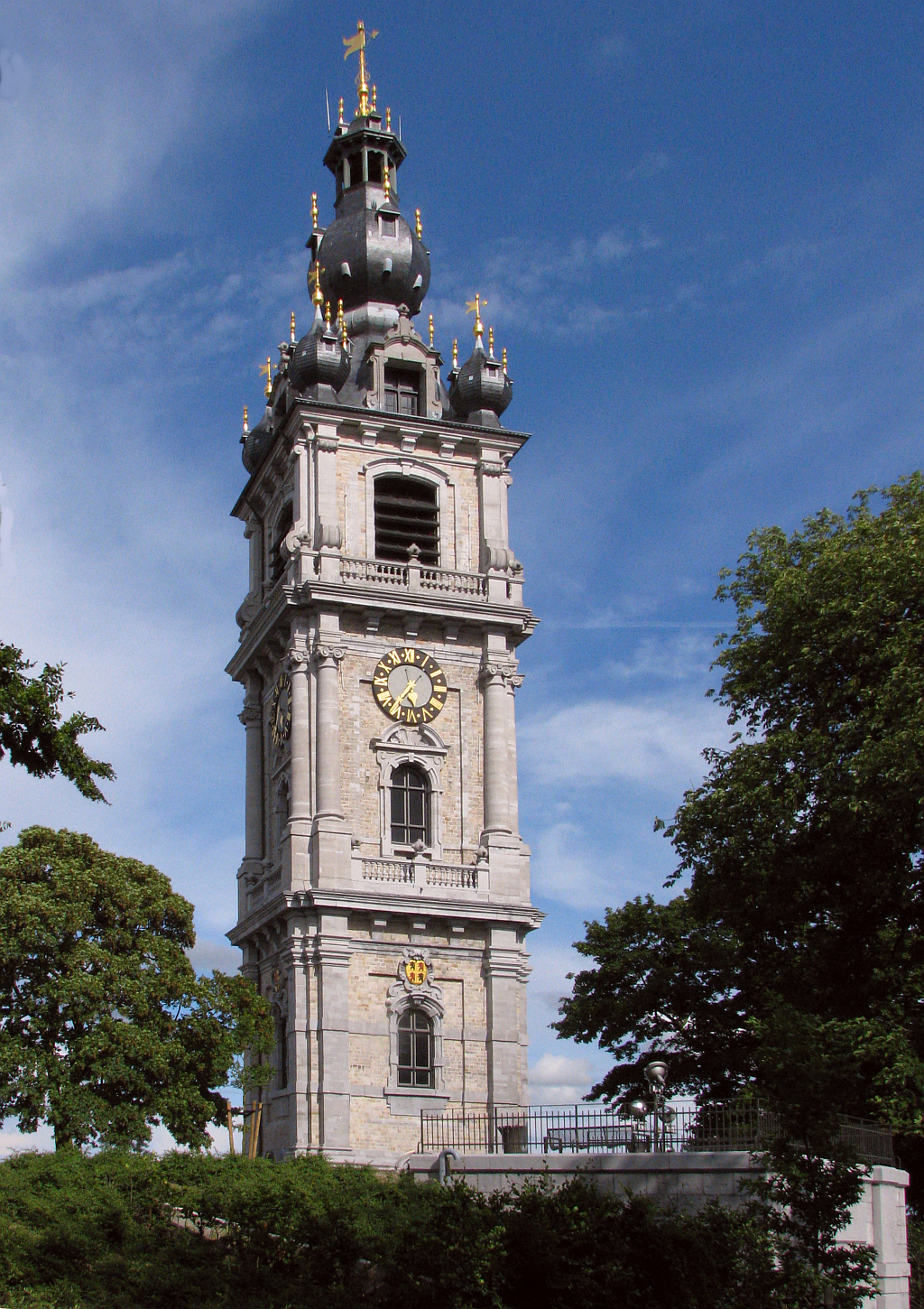 Beffroi Belfort barocke Belfried 17. Jh H 87m Weltkulturerbe „El catiau“ genannt in Mons in Belgien - Foto Wolfgang Pehlemann IMG_1687.jpg